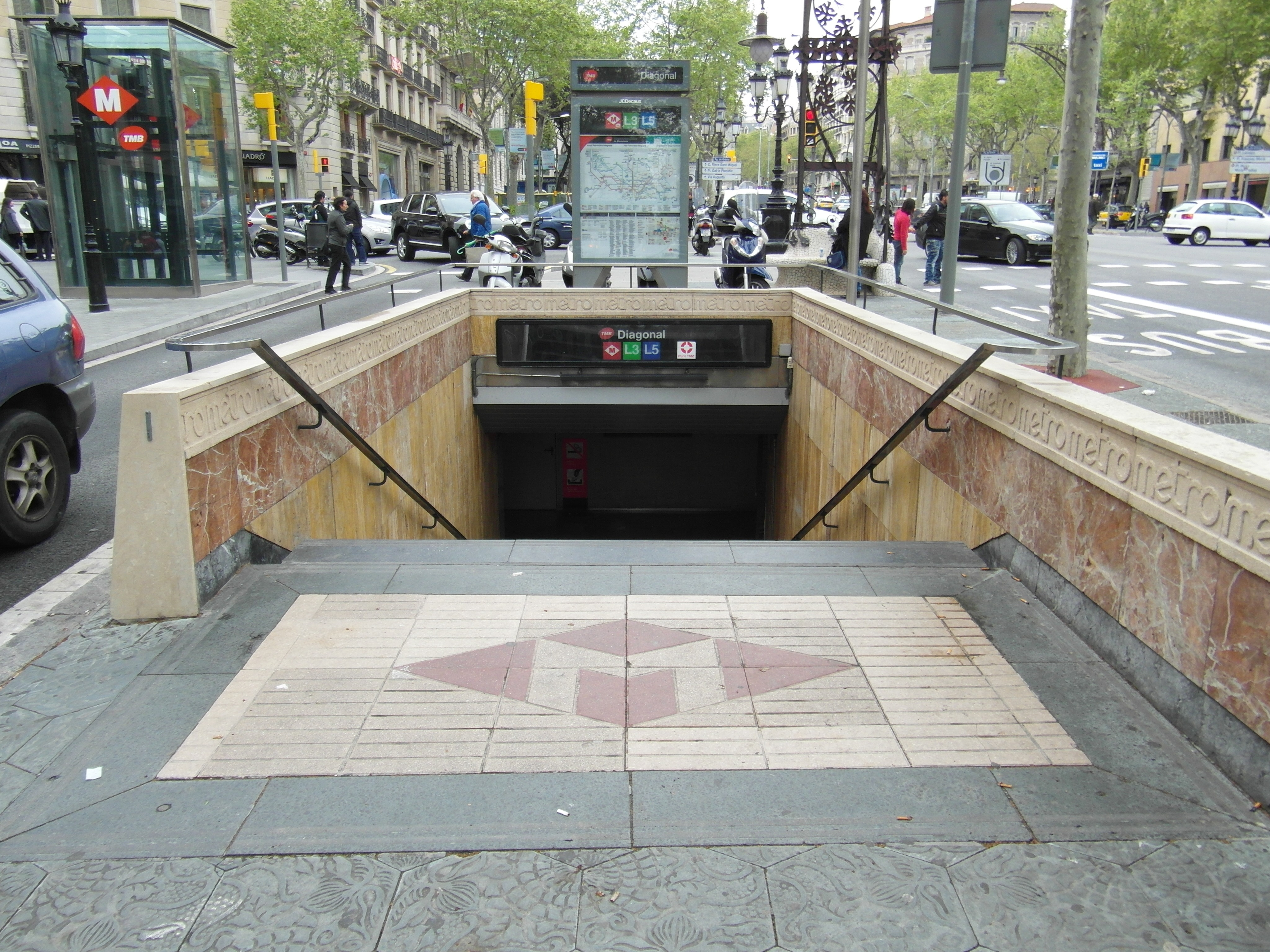 Barcelona - Estació de Diagonal-Provença